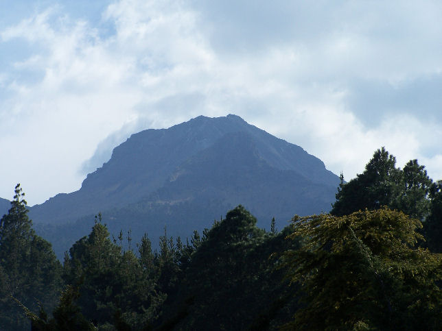 Volcan La Malinche, visto desde el albergue